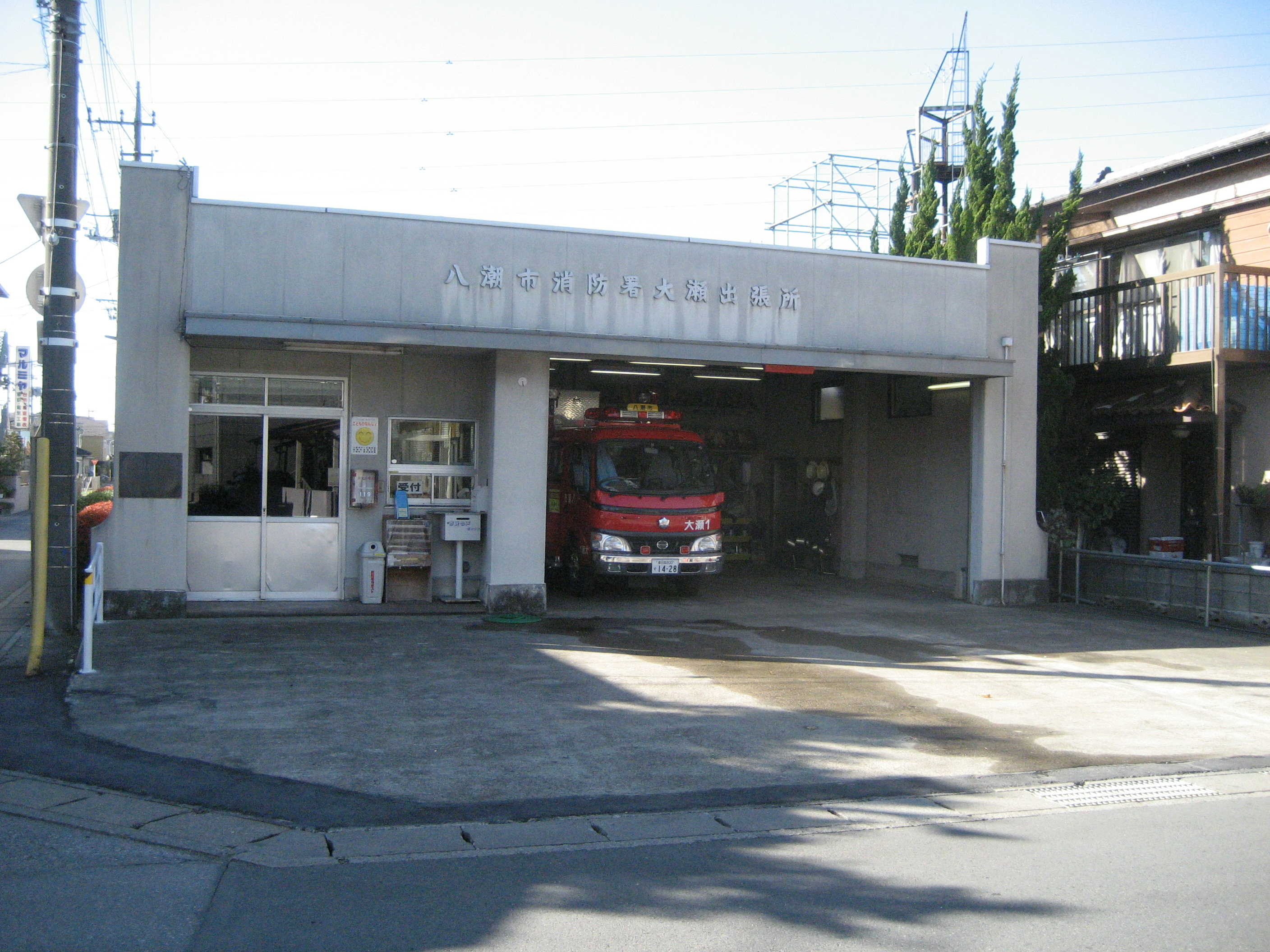 八潮市消防署大瀬出張所